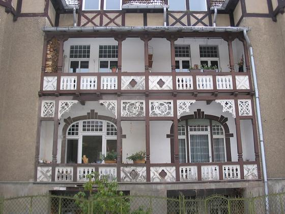 Alte Hausfassade in Klein-Glienicke, Potsdam